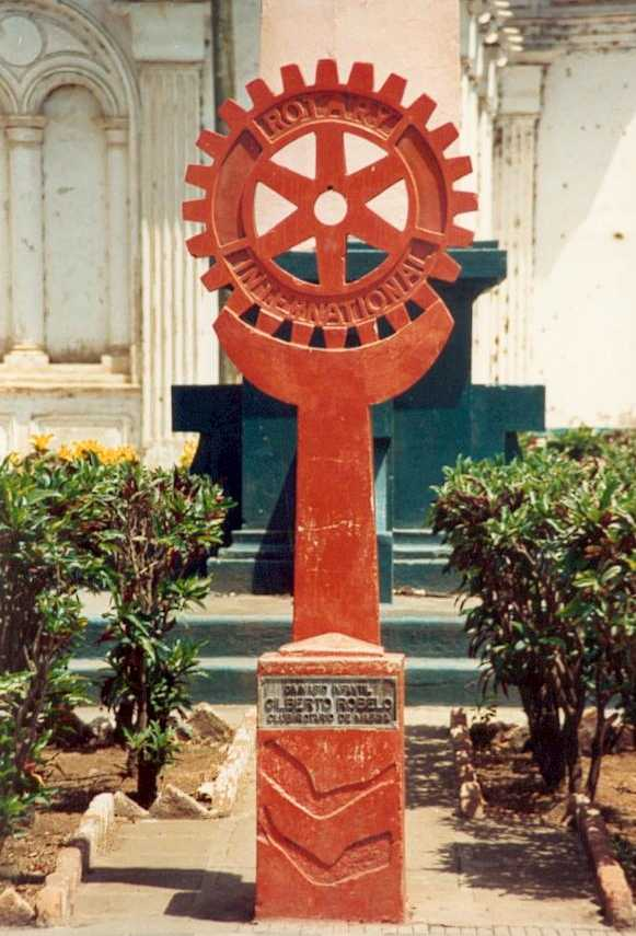 Detalle en la ciudad de Masaya Nicaragua América Central (1988).